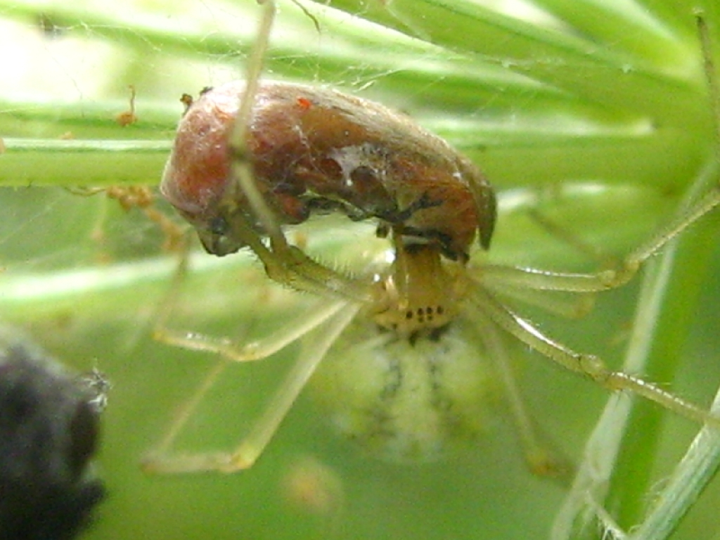 Die Kugelspinne Enoplognatha lineata oder E. latimana, beide Arten sind nur anhand der Epigynegrube der Genitalien auseinanderzuhalten. Gefunden im Stadtwald Nauen (Brandenburg)